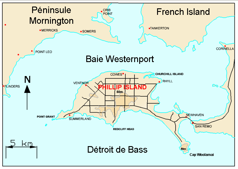 Carte de la baie Westernport et de Phillip Island